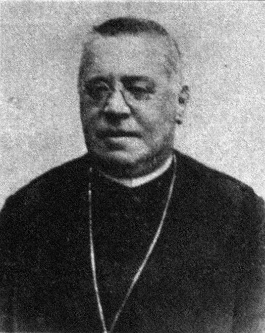 Österreichischer Politiker, Reichsratswahl 1907, Name siehe Dateiname